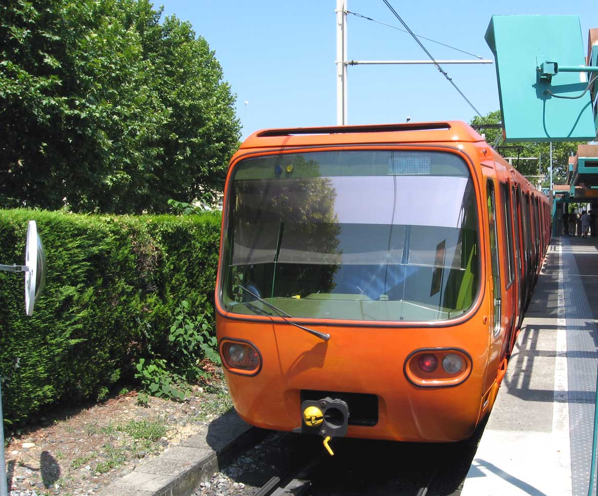 Face avant de rame de la ligne C au terminus de Cuire, Lyon, France